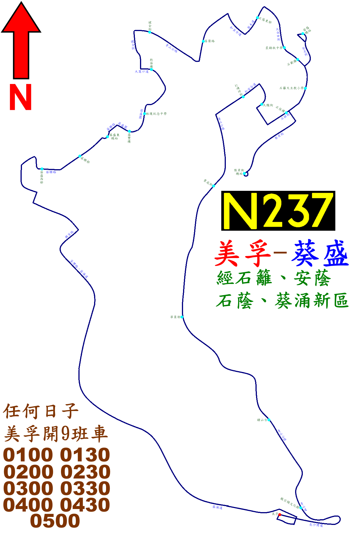 中文（香港）: 九巴N237的走線圖